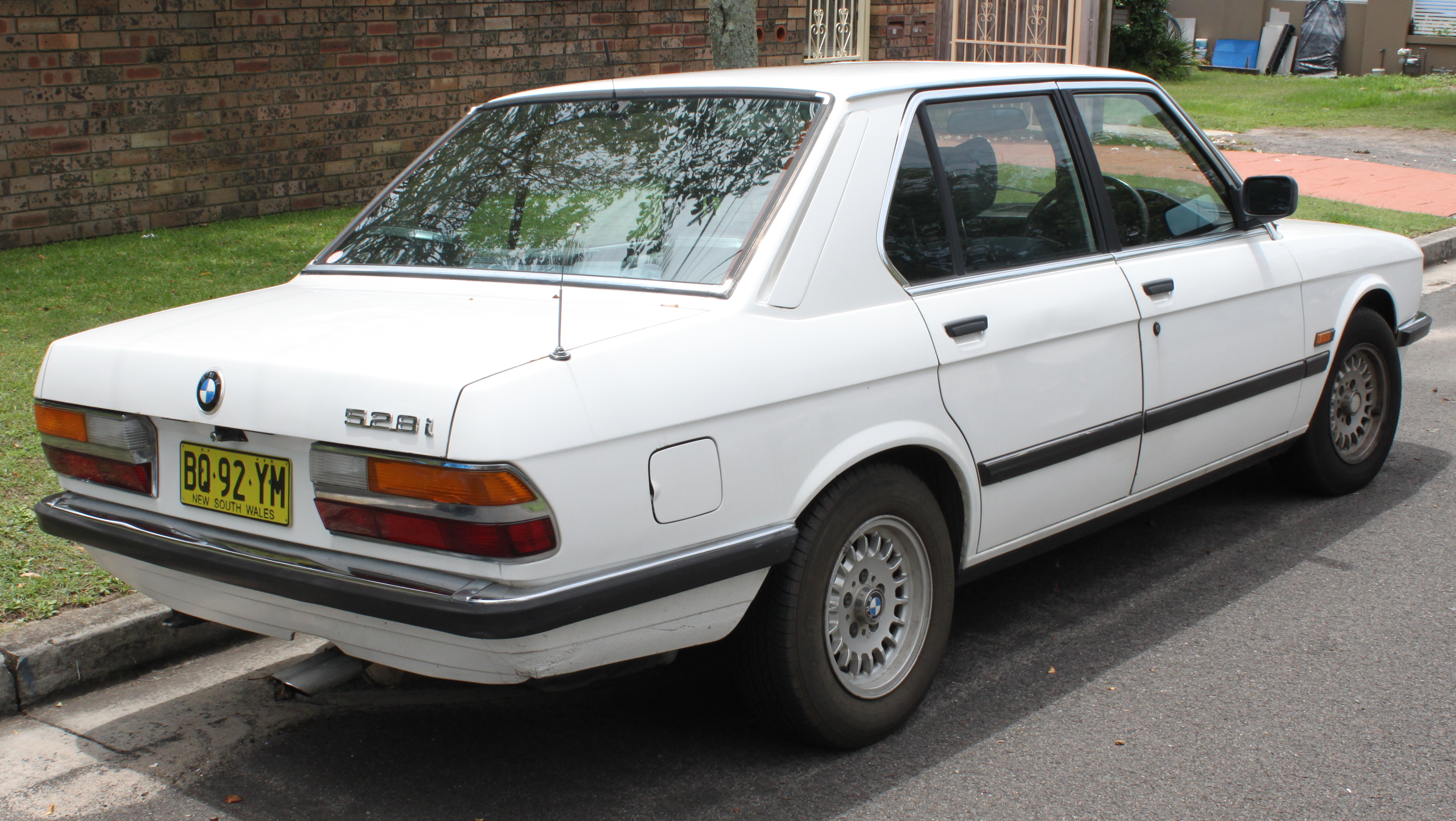 BMW E28 528i